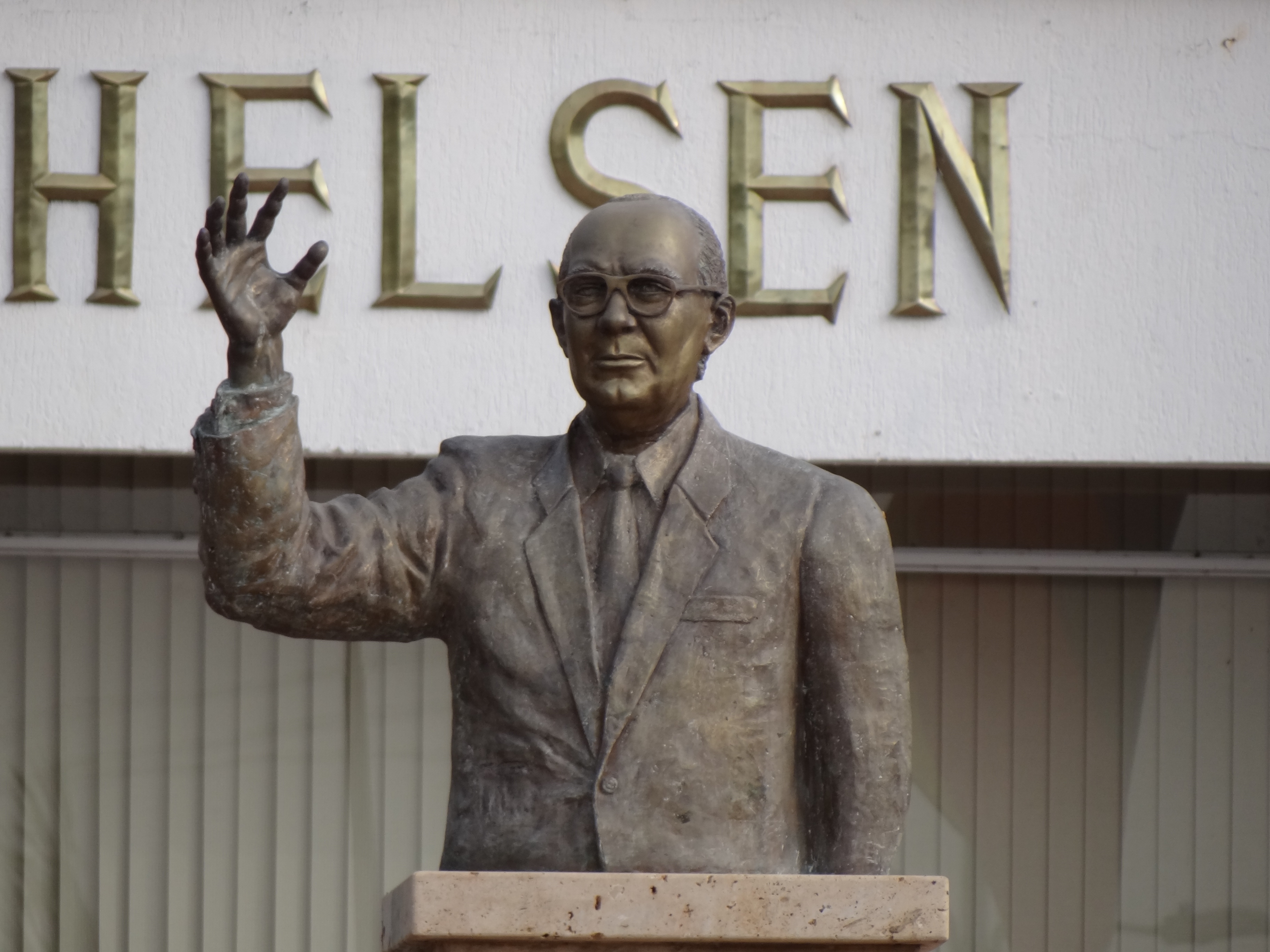 Monumento a Alfonso López Michelsen en la Plaza Alfonso López Michelsen en la ciudad de Valledupar, departamento del Cesar, Colombia